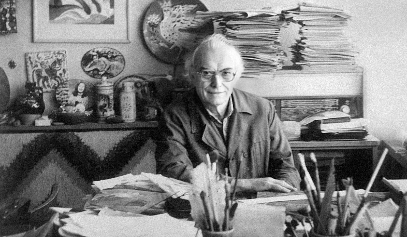 Олександр Губарев у власній творчій майстерні